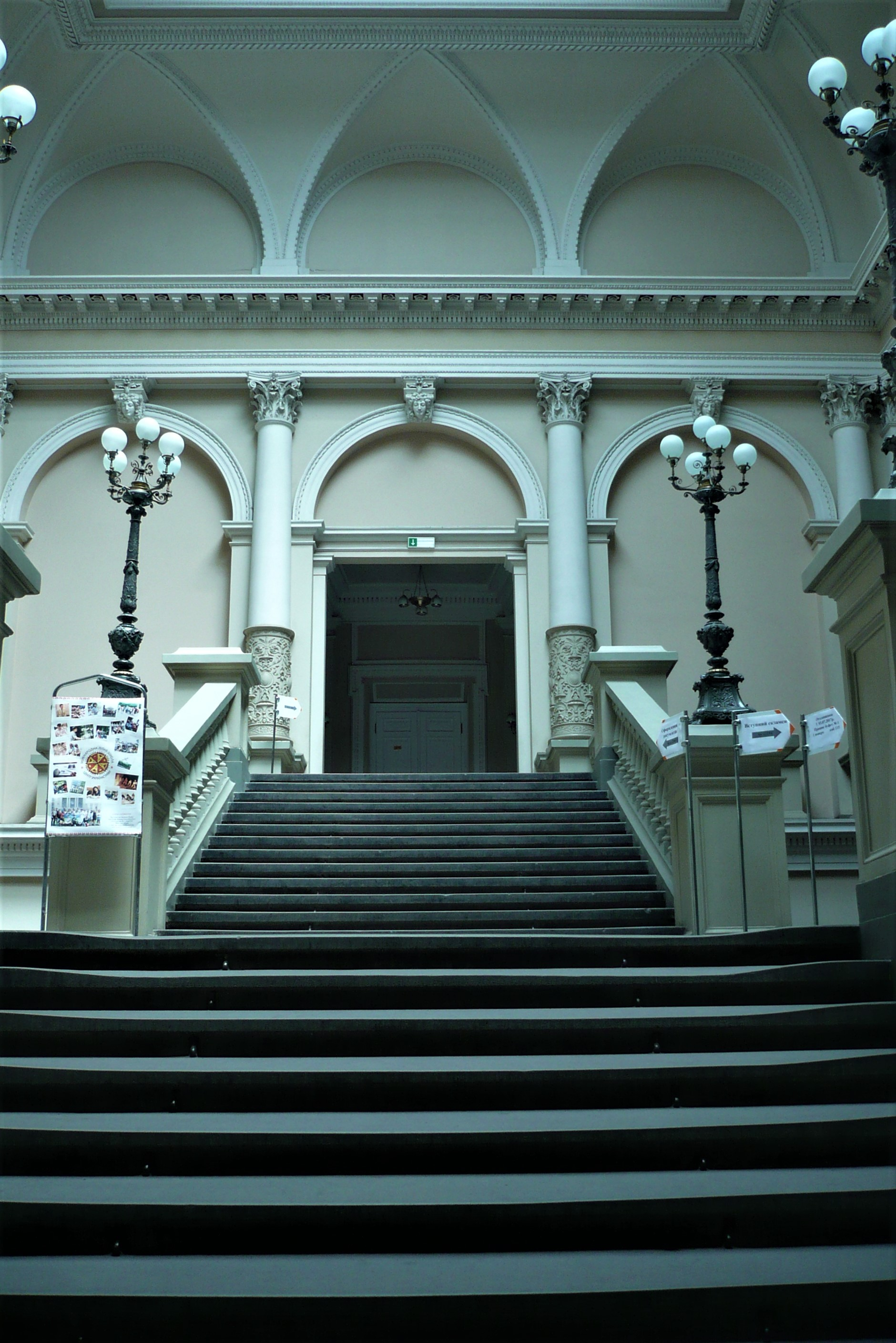 Lwowski Uniwersytet Narodowy im. Iwana Franki. Hol